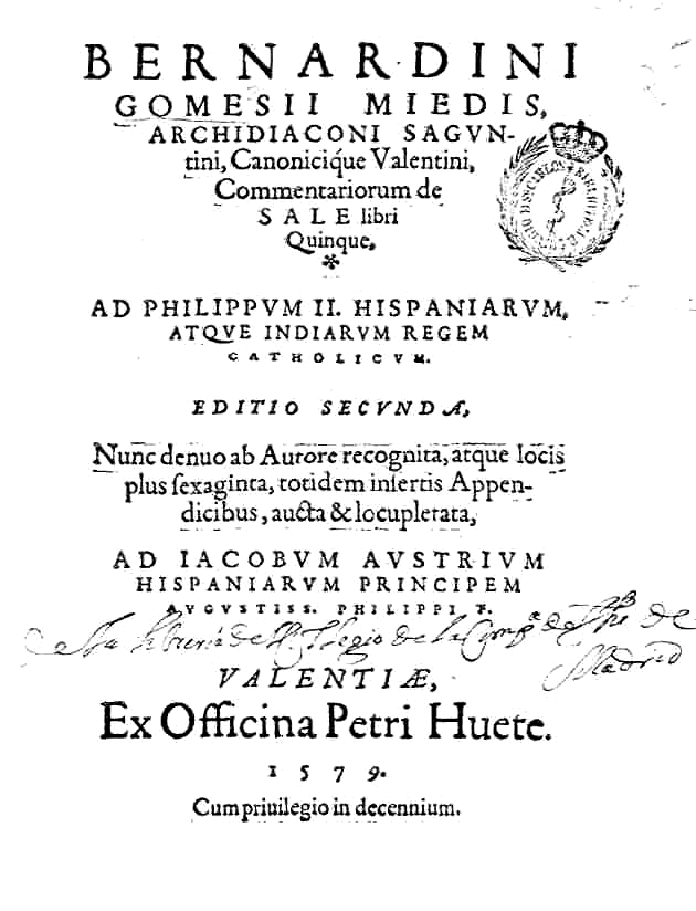 Bernardino Gómez Miedes, Commentariorum de Sal libri quinque, 1579